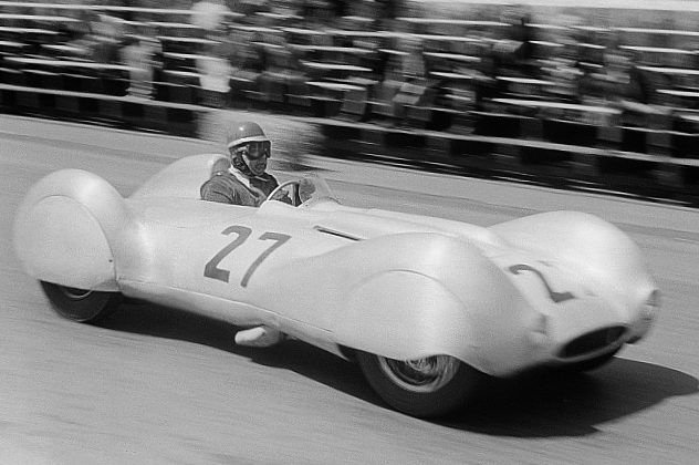 Original image description from the Deutsche Fotothek Arthur Rosenhammer in einem EMW 1500ccm-Sportwagen beim 6. Leipziger Stadtparkrennen